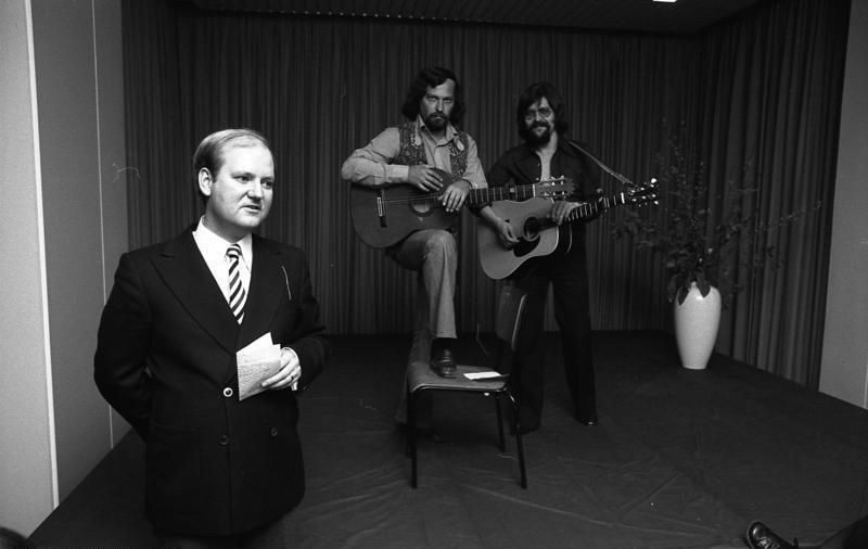 Landesvertretung Berlin in Bonn. Vortragsabend mit "Schobert & Black"